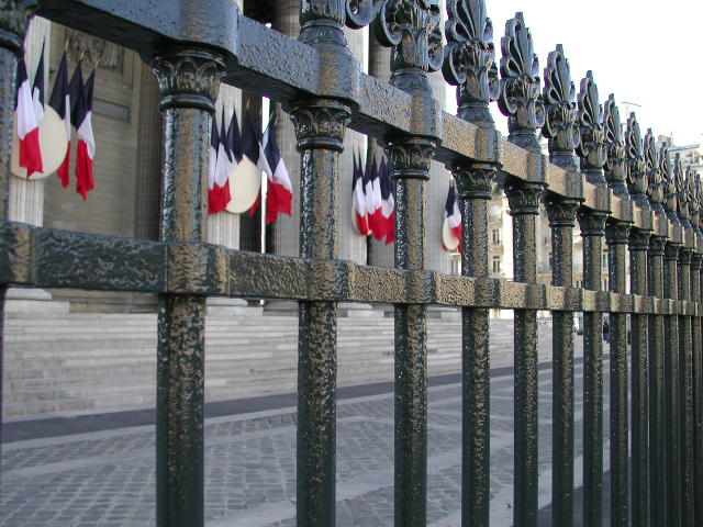 grille à palmettes du Panthéon de Paris.